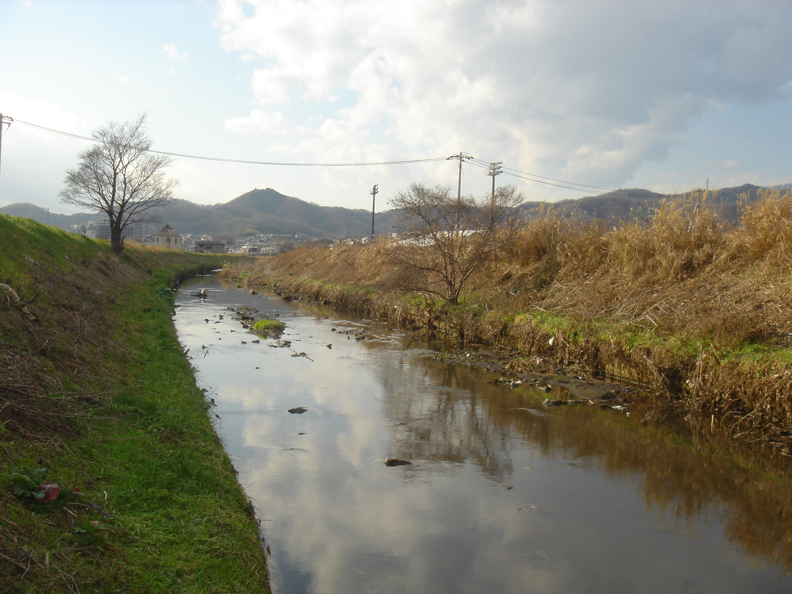 大根川（おおねがわ）。秦野市立おおね公園南、真田橋付近。